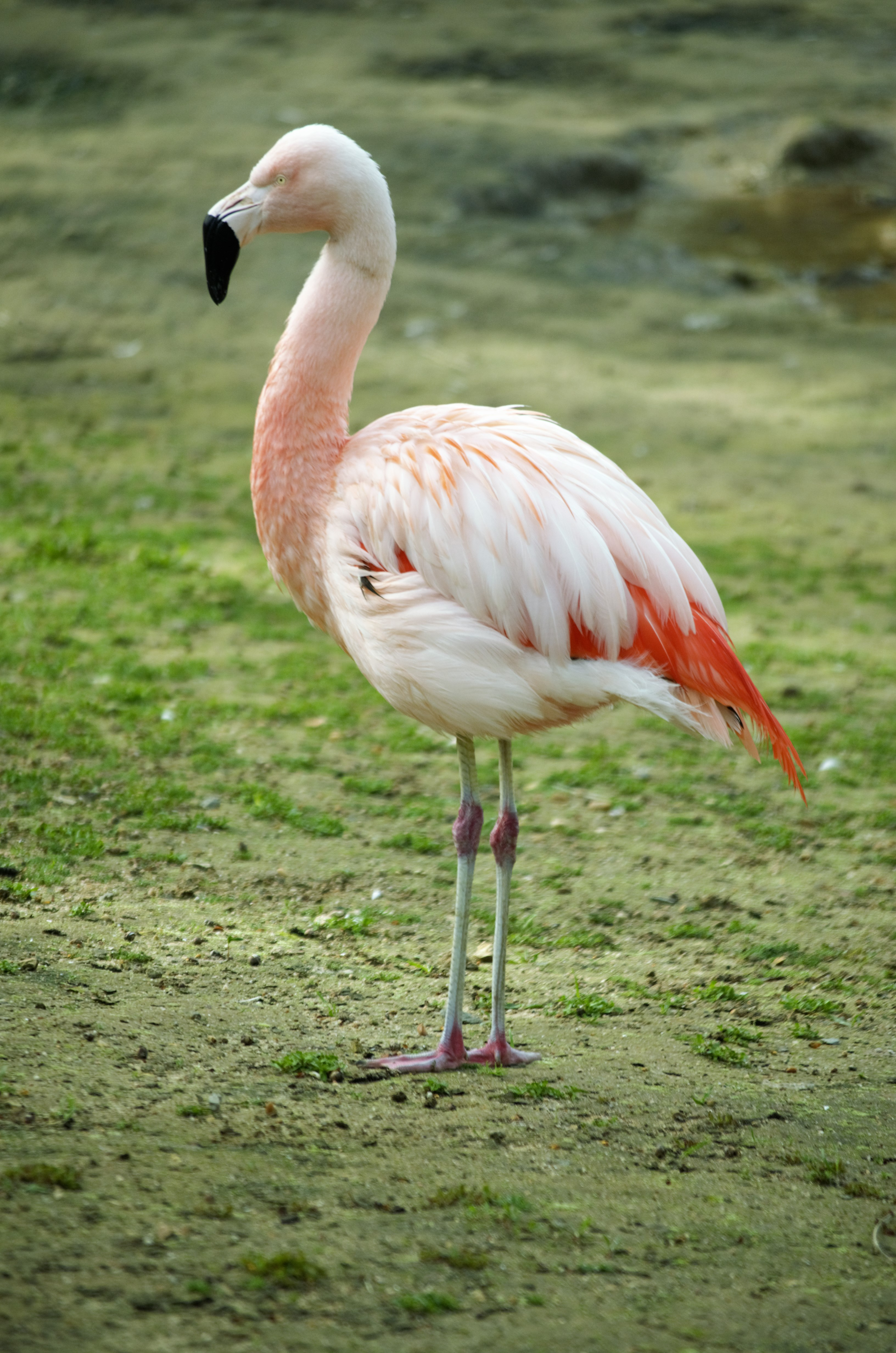 Flamant du Chili (Phoenicopterus chilensis) au Jardin botanique de Tours, France.